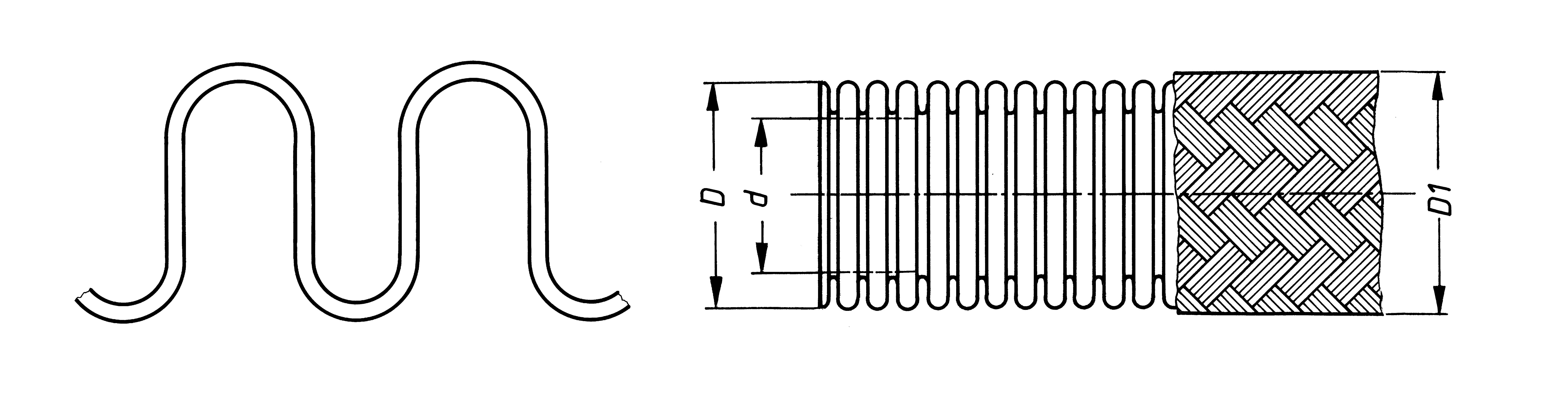 Schlauchprofil